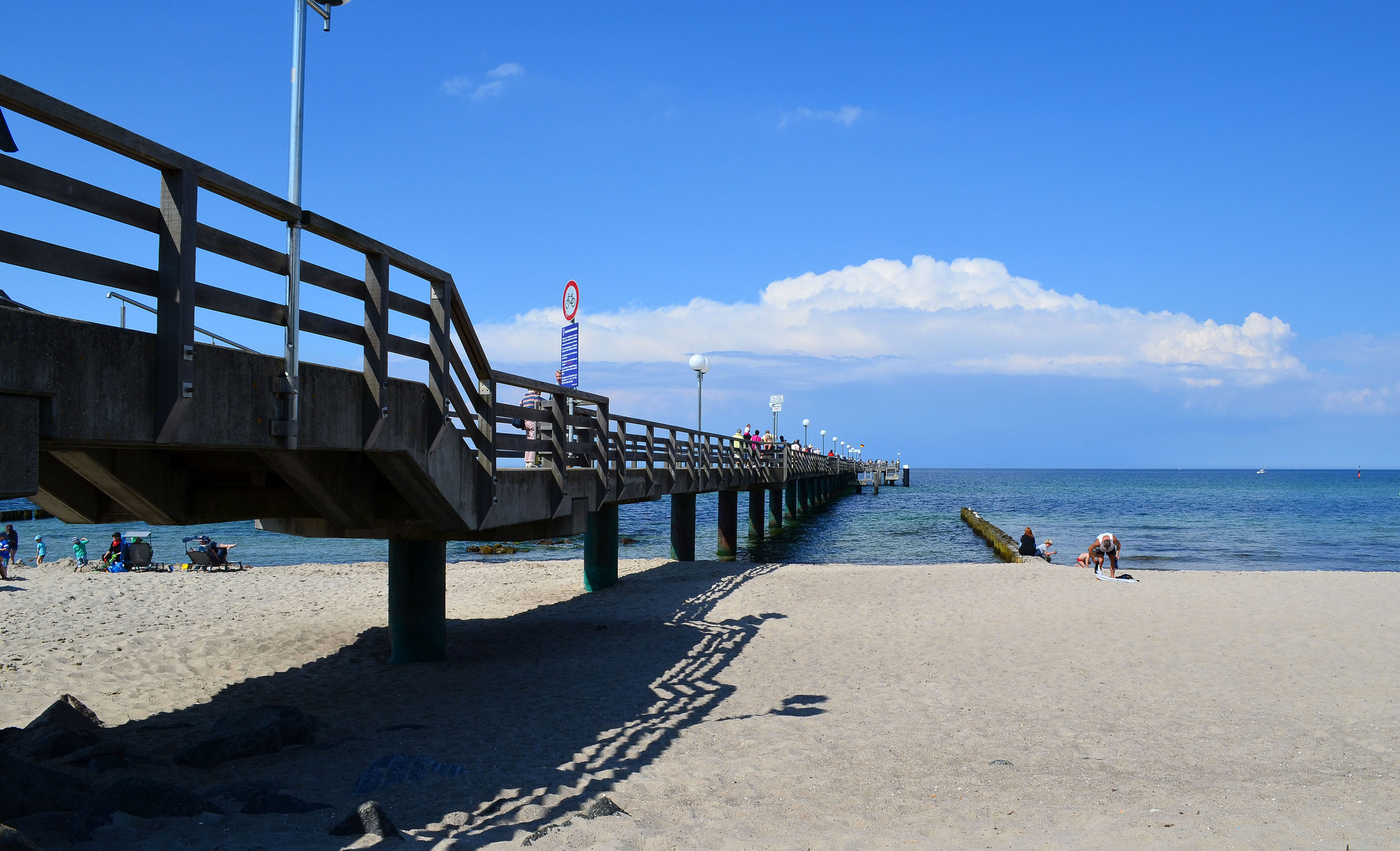 Kühlungsborn, an der Seebrücke entlang 1